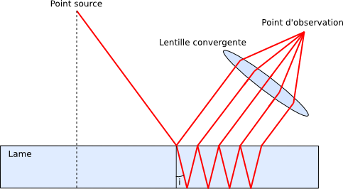 Schéma d'une lame de verre en configuration interféromètre de Haidinger.